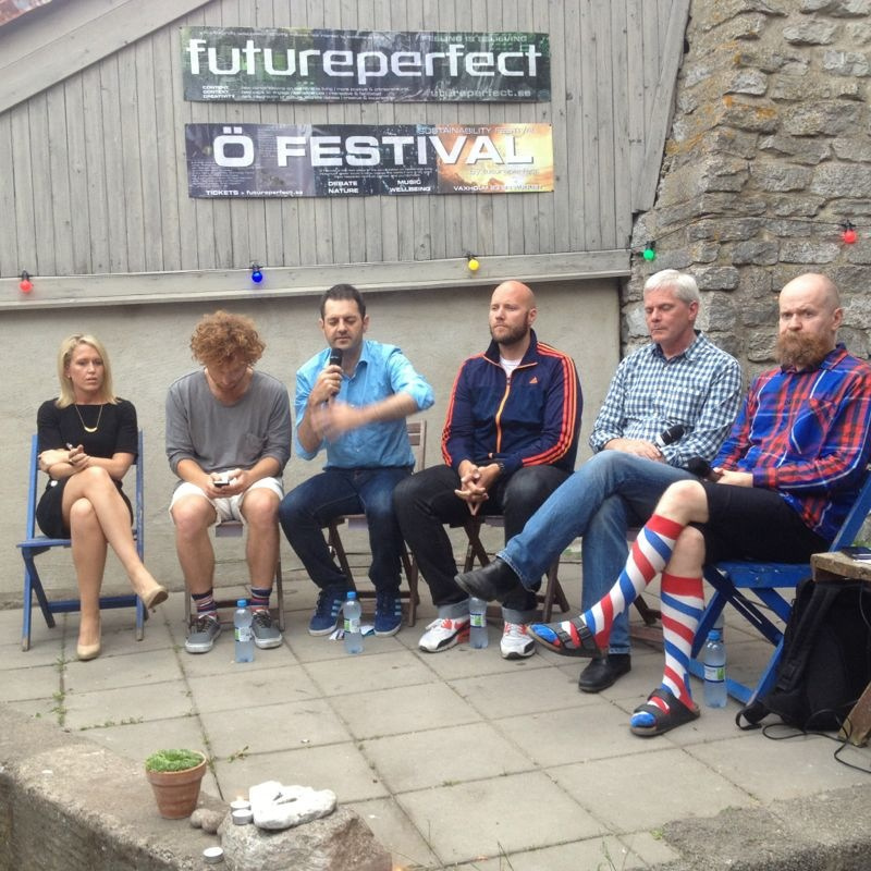 Paneldiskussion om mediernas framtid med Wikileaks, Futureperfect, Bambuser, BBC